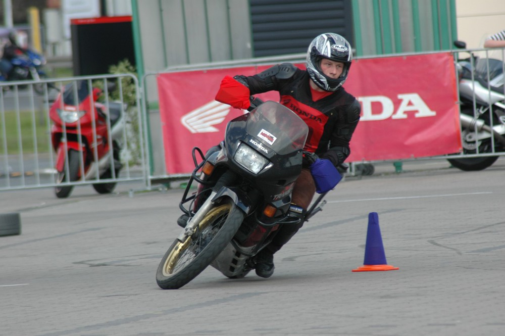 Początkujący gymkhaniści czasami zakładają czerwone i niebieskie elementy na kierownicę, by ułatwić sobie zapamiętanie z której strony omijać pachołki. Debiutant na zawodach Honda Gymkhana Krzysztof Kubanek